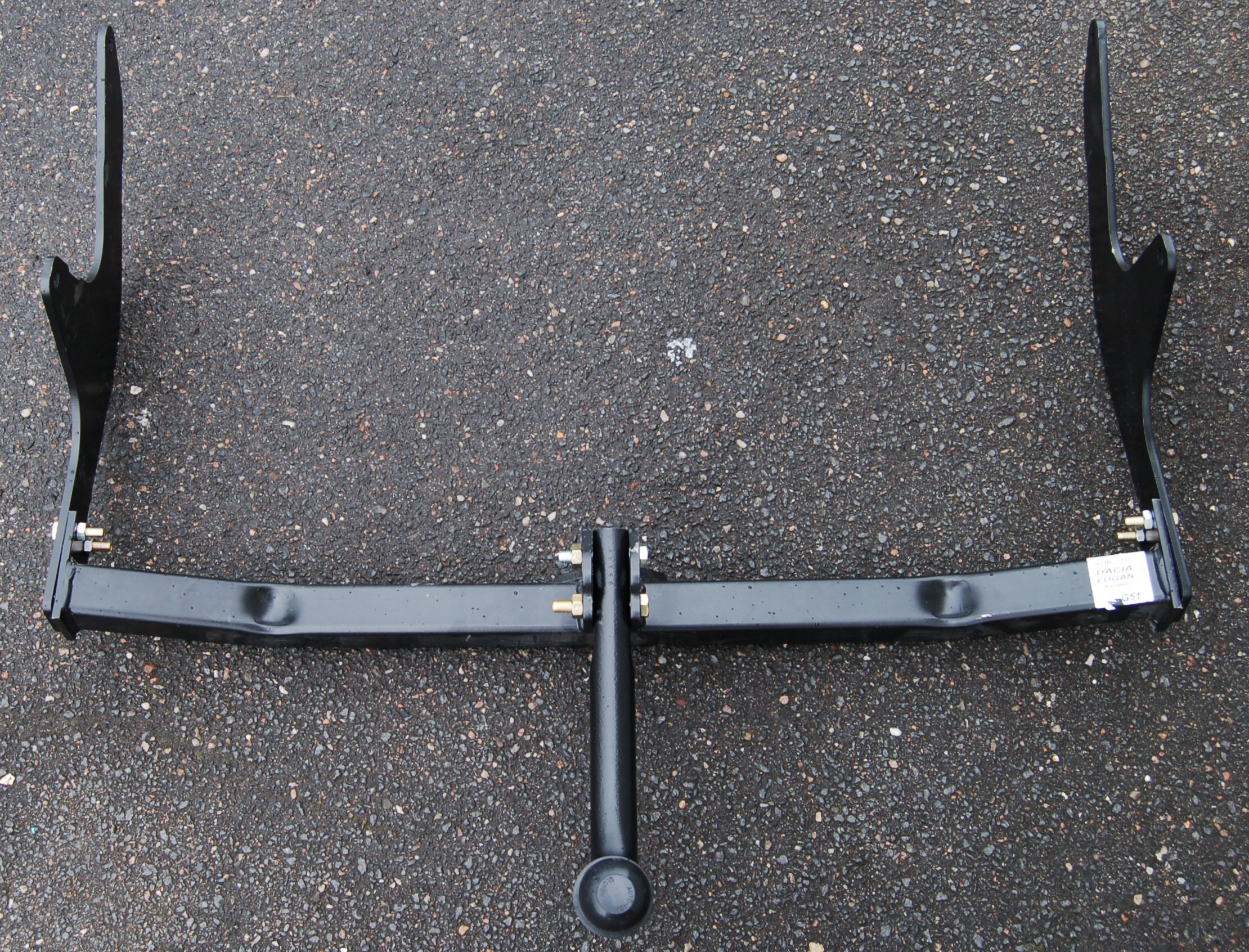 Komplette Anhängerkupplung eines PKWs (Dacia Logan)